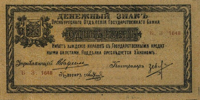 Оренбургское отделение Госбанка. Денежный знак 1 рубль. Аверс.